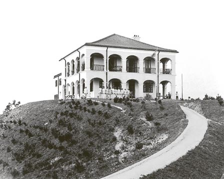 中文（香港）: 1905年的香港屏山警署（今屏山鄧族文物館）。